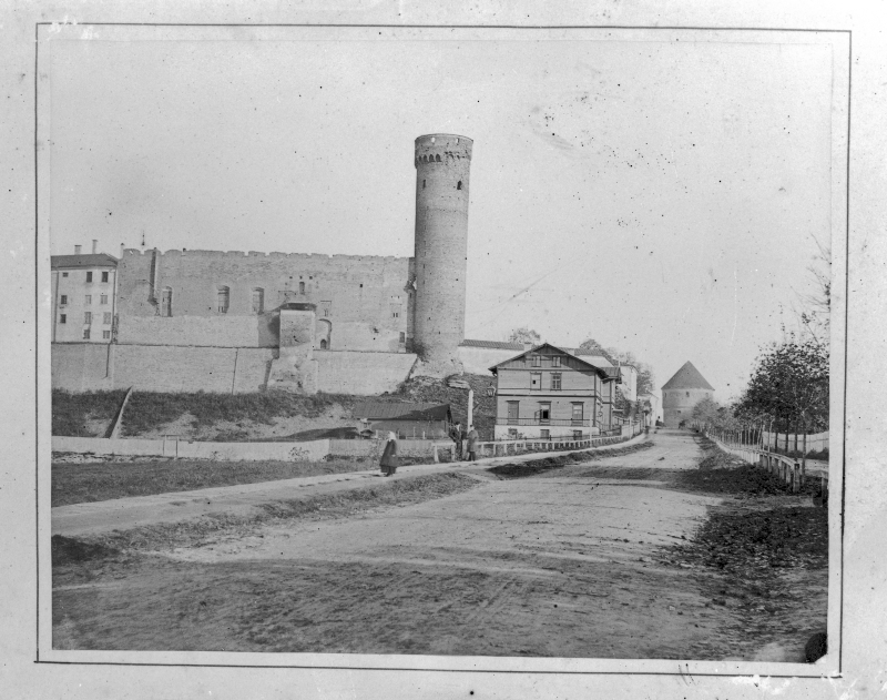 Toompea ja Falgi tänav. Vaade Toompuiestee poolt